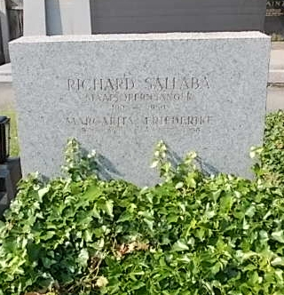 Richard Sallaba-Döblinger Friedhof (I1-5-6)